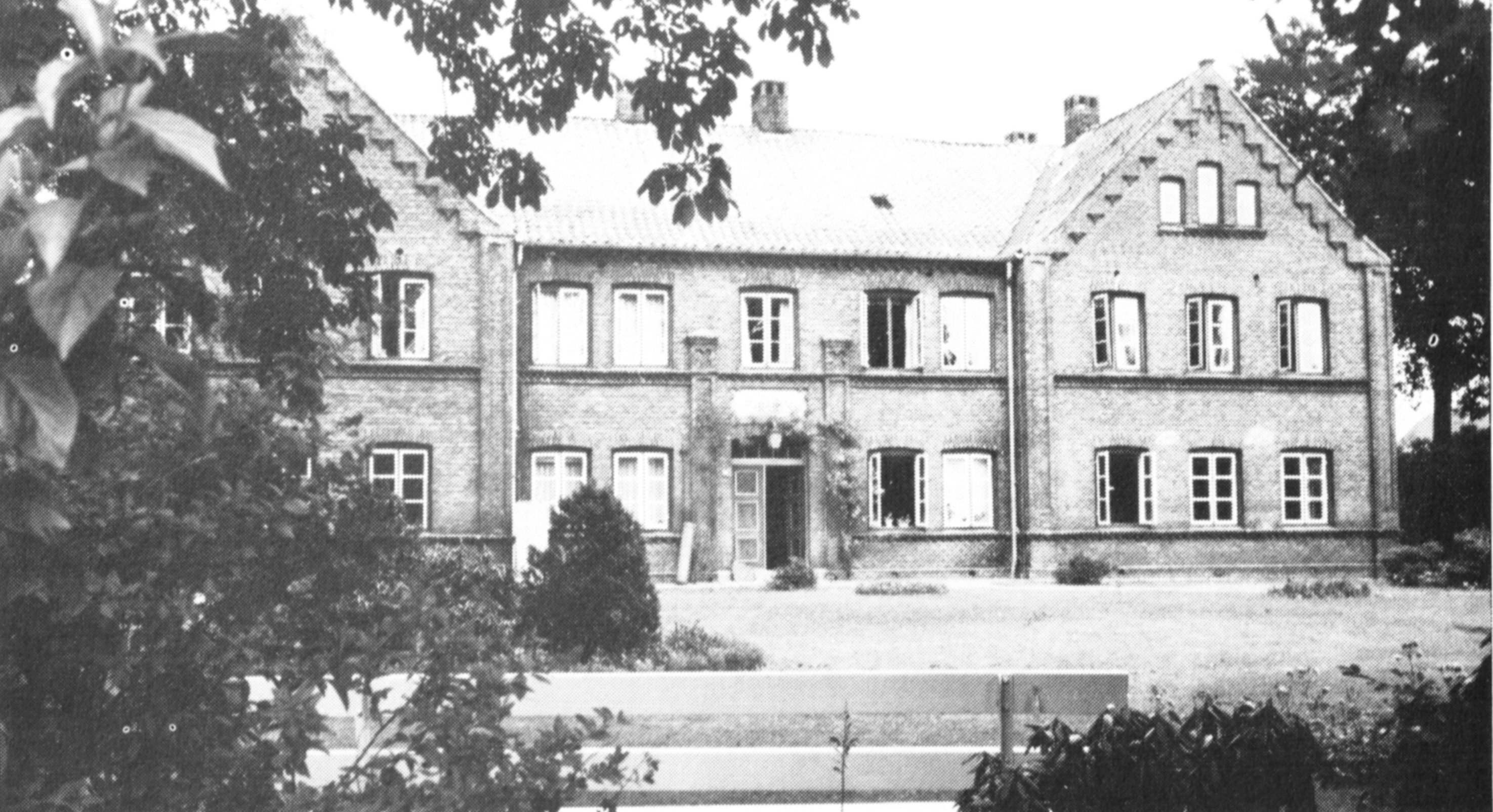 Das Uetersen Werk- und Armenhaus im Jahr 1866, später wurde daraus ein Altenheim